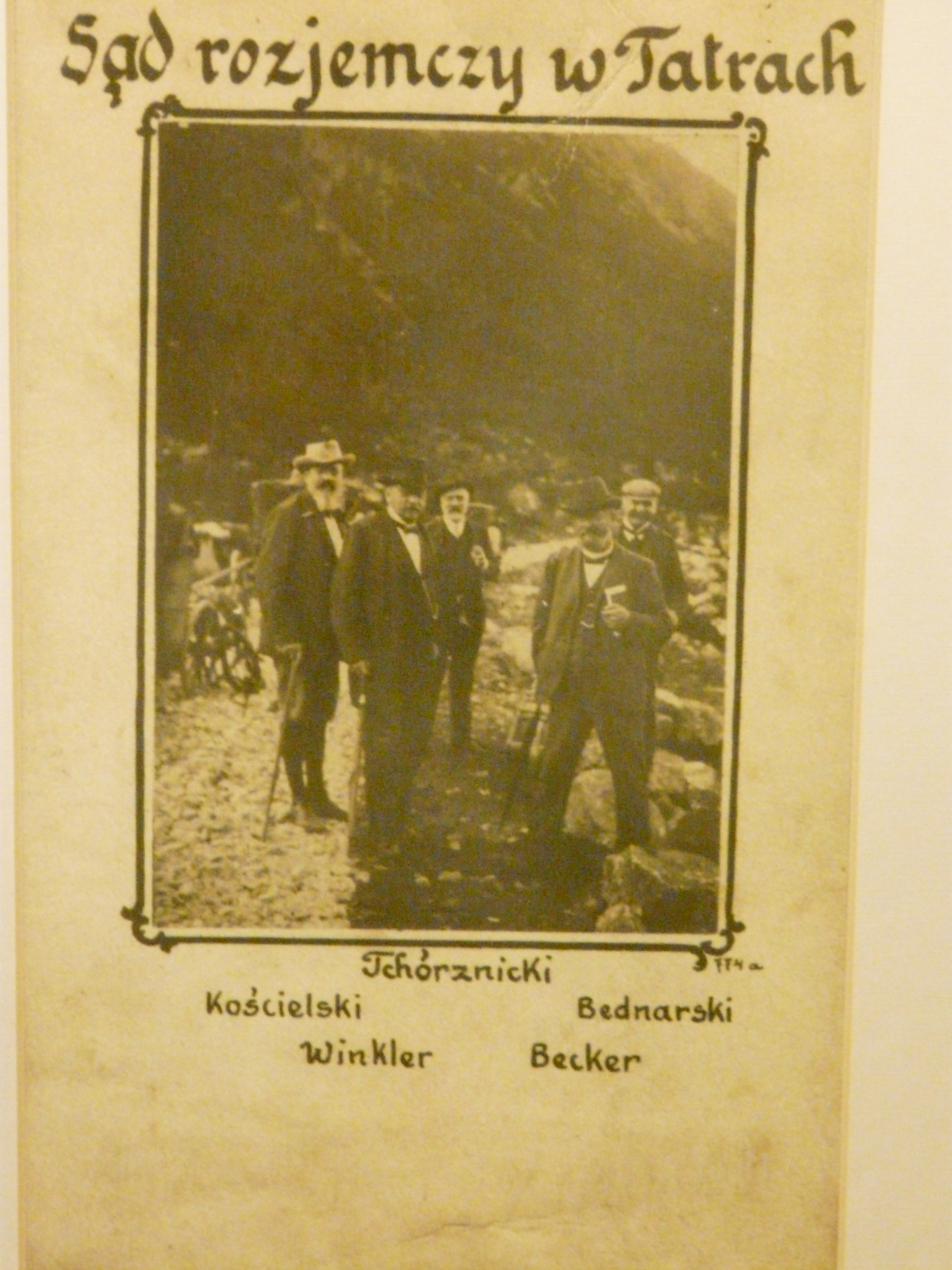 Zakopane. Zespół dworsko-parkowy w Kuźnicach, okolice i wnętrza. Uczestnicy wizji lokalnej (sąd rozjemczy w Tatrach) nad Morskim Okiem, 4-5.09.1902. Tchórznicki, Kościelski, Bednarski, Winkler, Beckler.